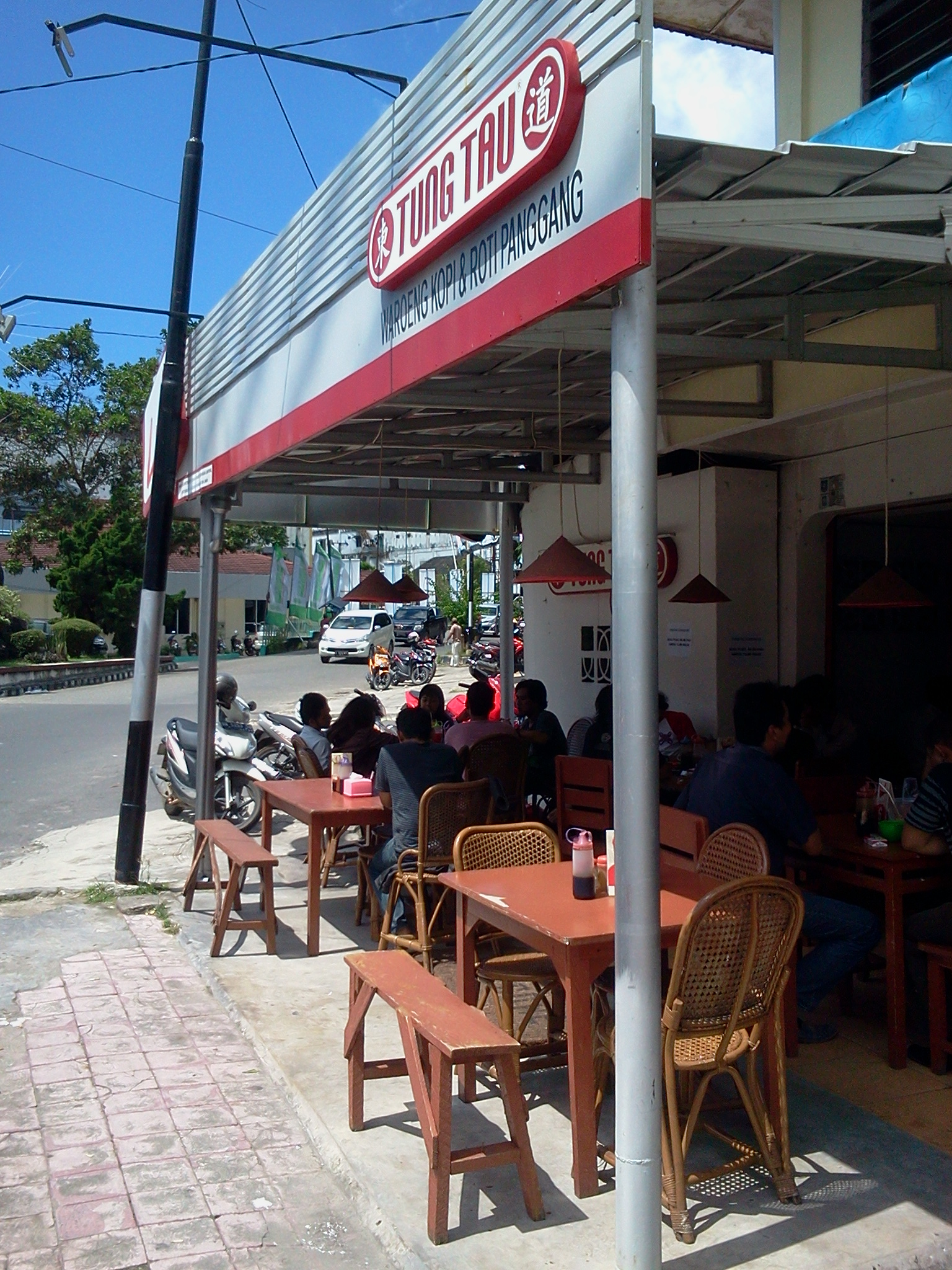 Salah Satu Sudut Warung Kopi Tung Tau